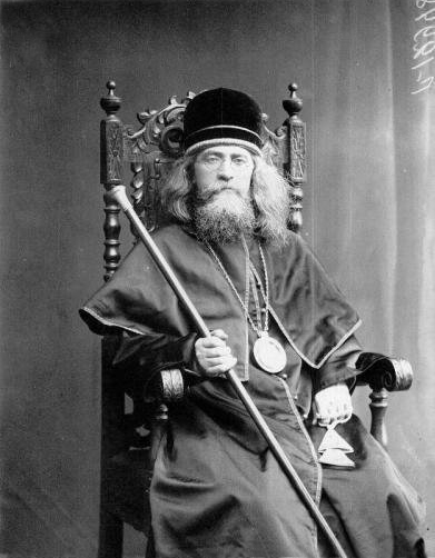 Епископ Охтенский Симеон (Шлеев)